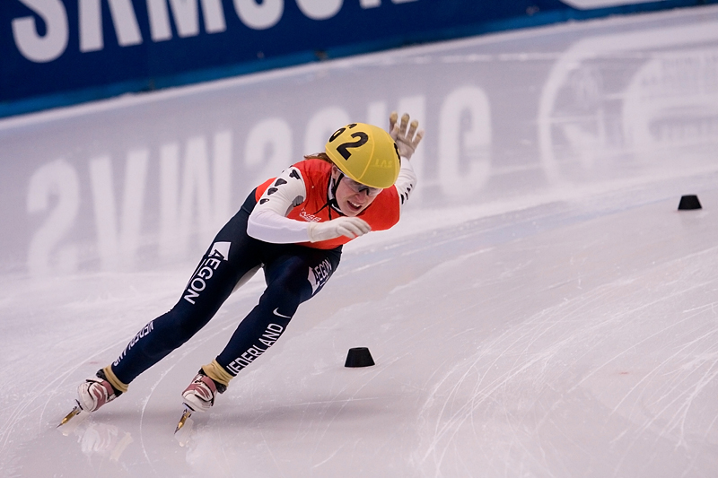 Dutch skater Maaike Vos